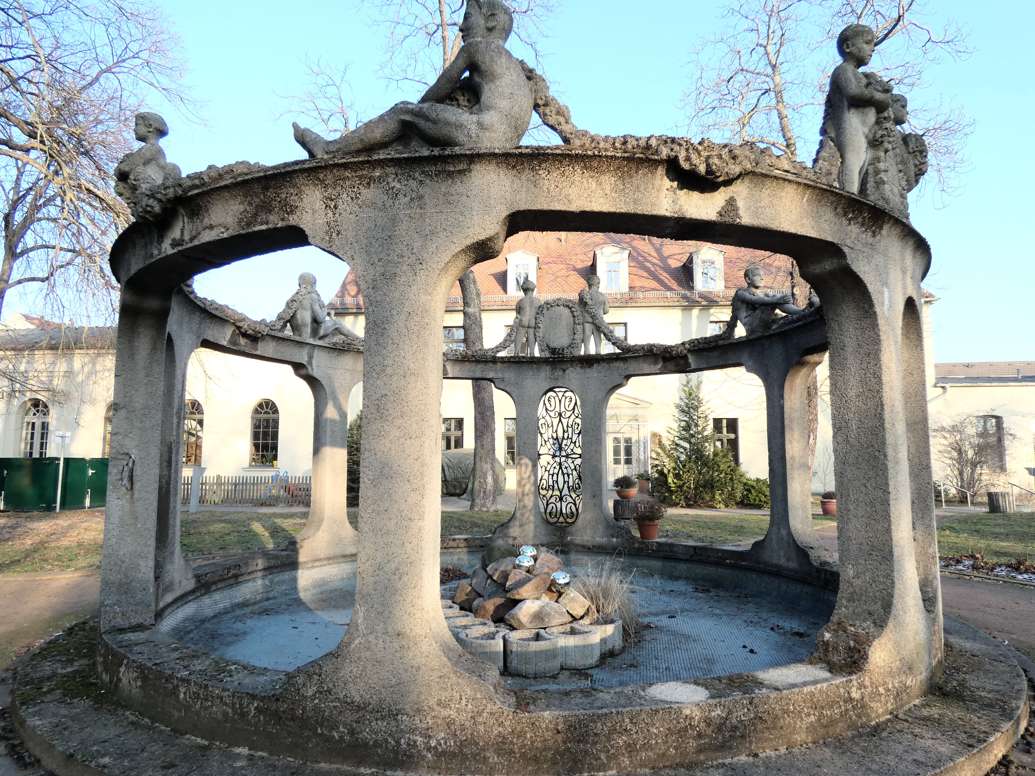 Bethcke-Lehmann-Brunnen, im Garten des Bethcke-Lehmann-Hauses, Burgstraße 45b, Halle (Saale)